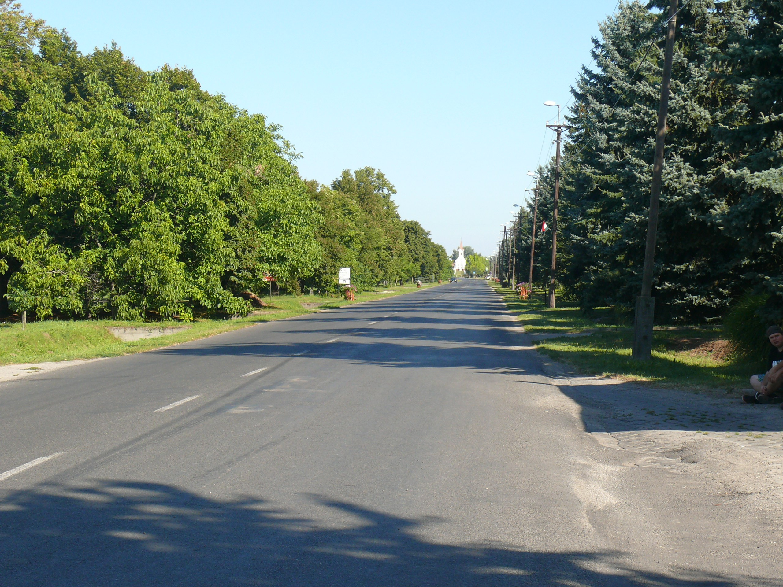 A vaskúti Kossuth Lajos utca északi fele, háttérben a Kálváriával